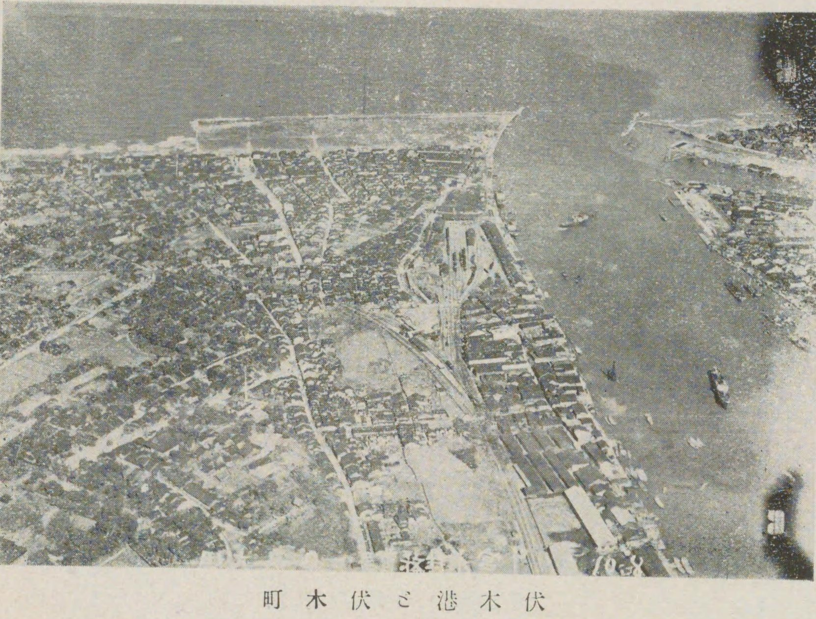 伏木港と伏木町の航空写真